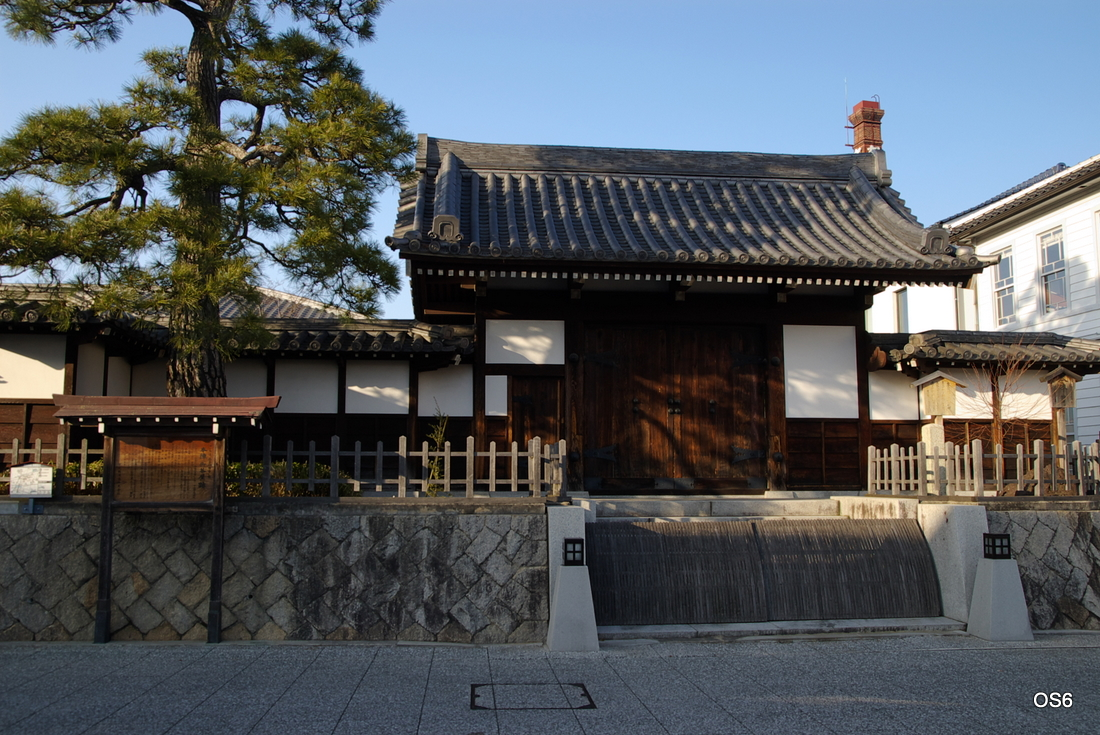 御茶屋（本陣）跡 Ochaya(Honjin)